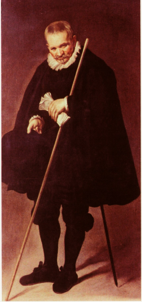 Única fotografía a color conocida del retrato de Francisco de Ocáriz y Ochoa, de Diego Velázquez, tomada de una diapositiva adquirida en Madrid en 1960, última vez que se vio en público el cuadro, publicada en CRUZ VALDOVINOS, J. M., Diego Velázquez, Vida y obra de un pintor cortesano, Zaragoza: Caja Inmaculada, 2011. ISBN: 978-84-96869-41-7